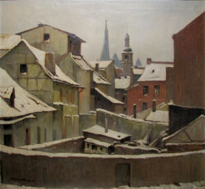 Sicht auf die Düsseldorfer Altstadt, vermutlich von einem Studio der Kunstakademie aus